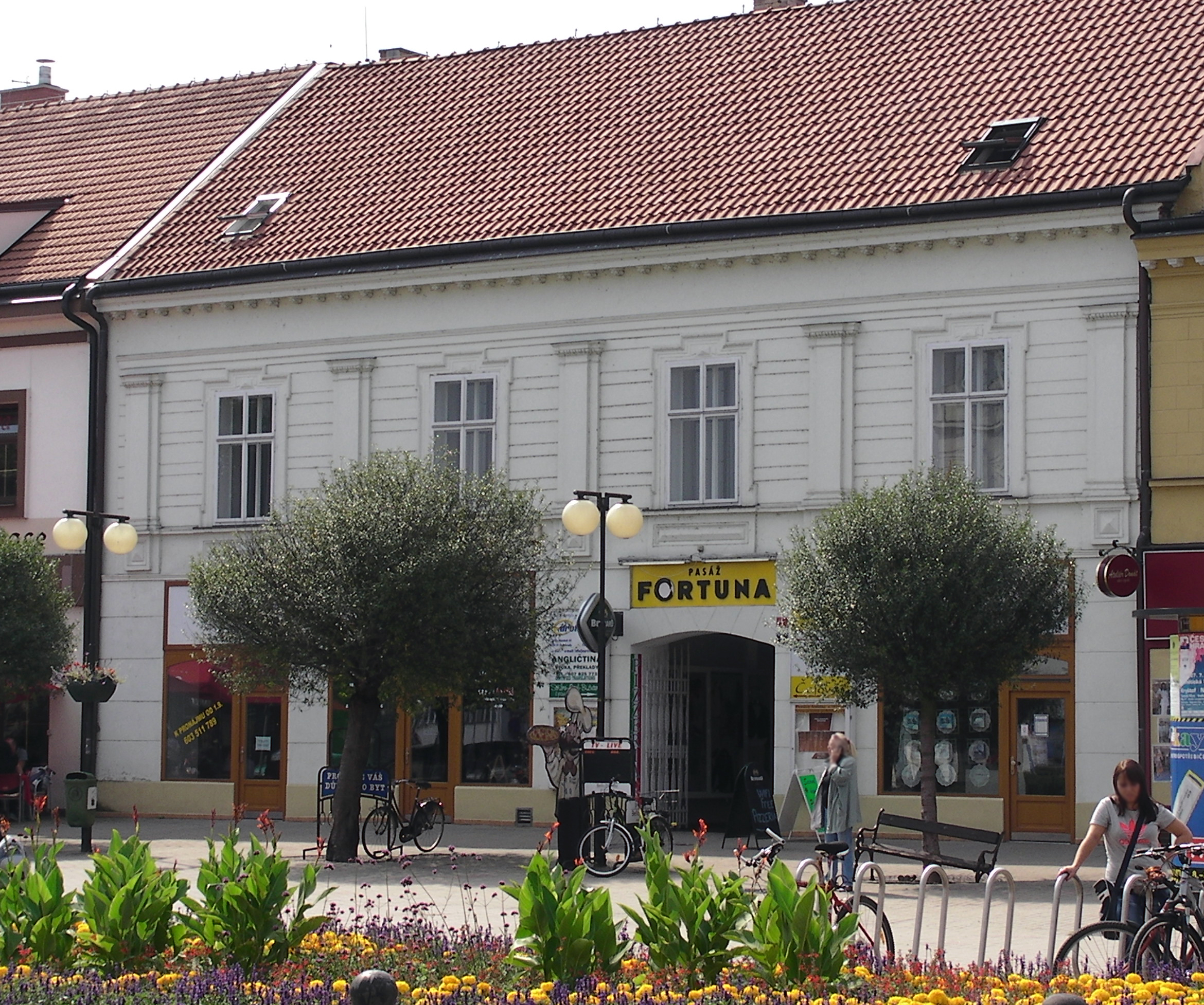 Dům na Jiřího nám. 4/5.